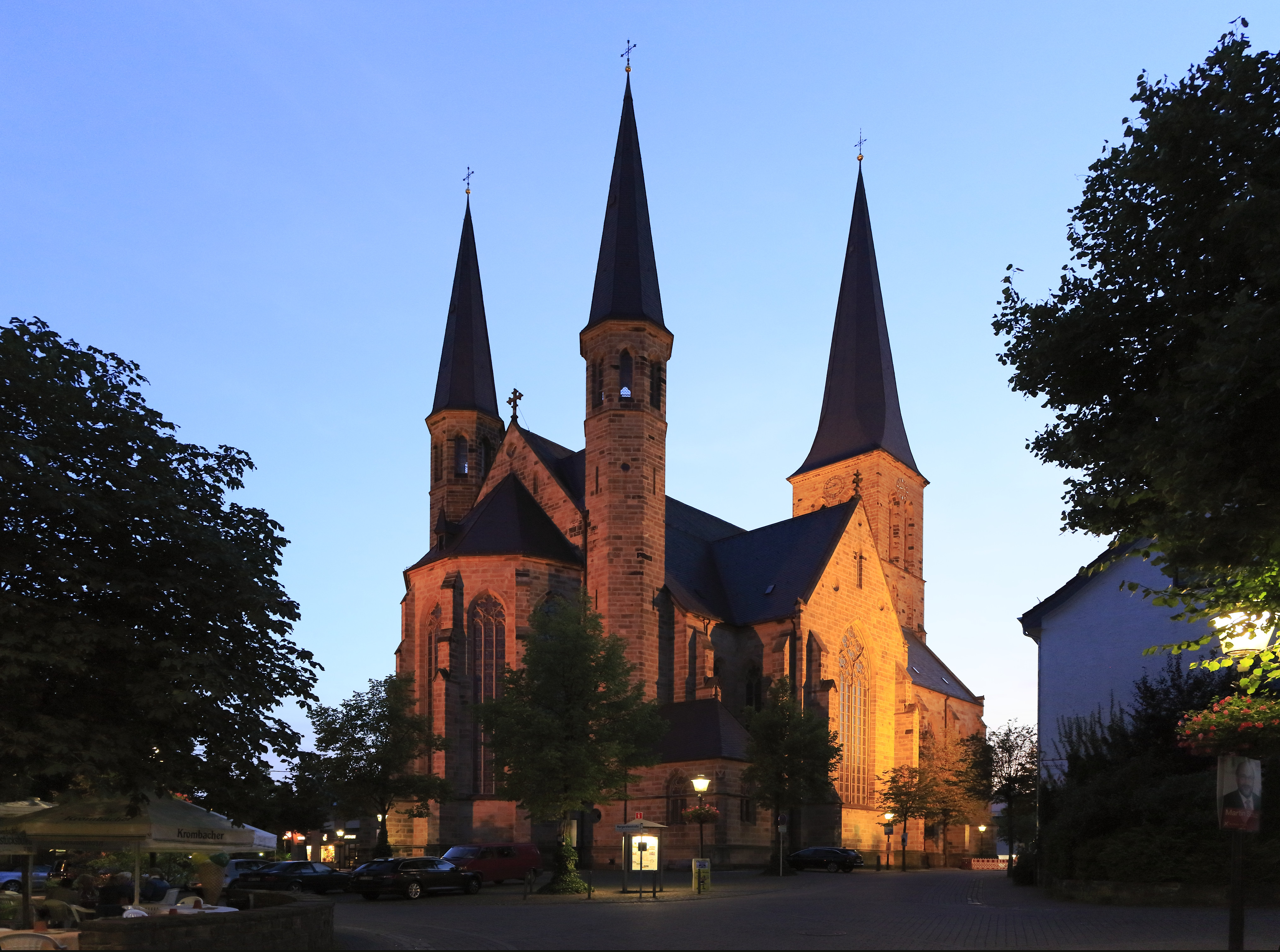 Die Ostseite von der Überwasserstraße am späten Abend nach Sonnenuntergang